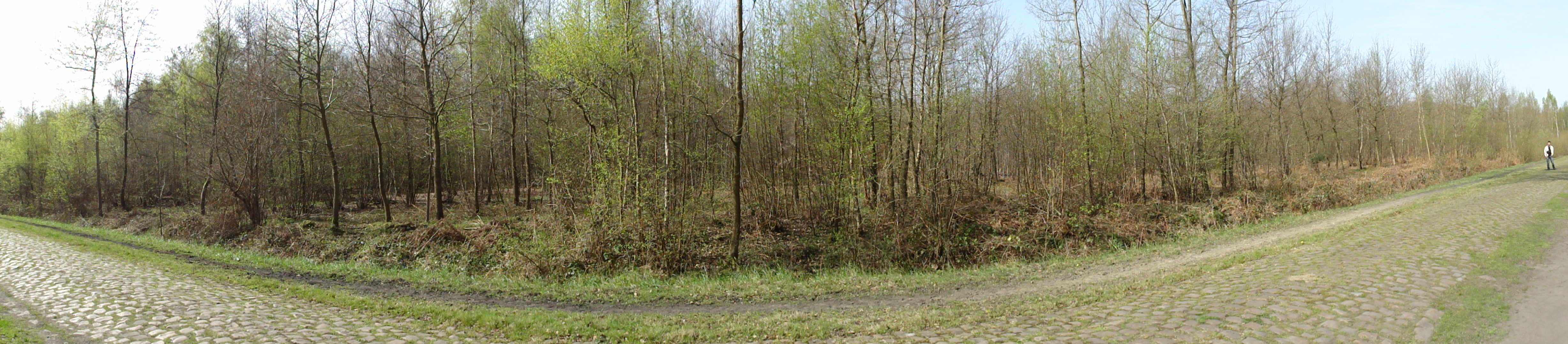 L'Avaleresse des Boules de la Compagnie d'Hasnon était un puits sans exploitation situé à Wallers, Nord, Nord-Pas-de-Calais, France.